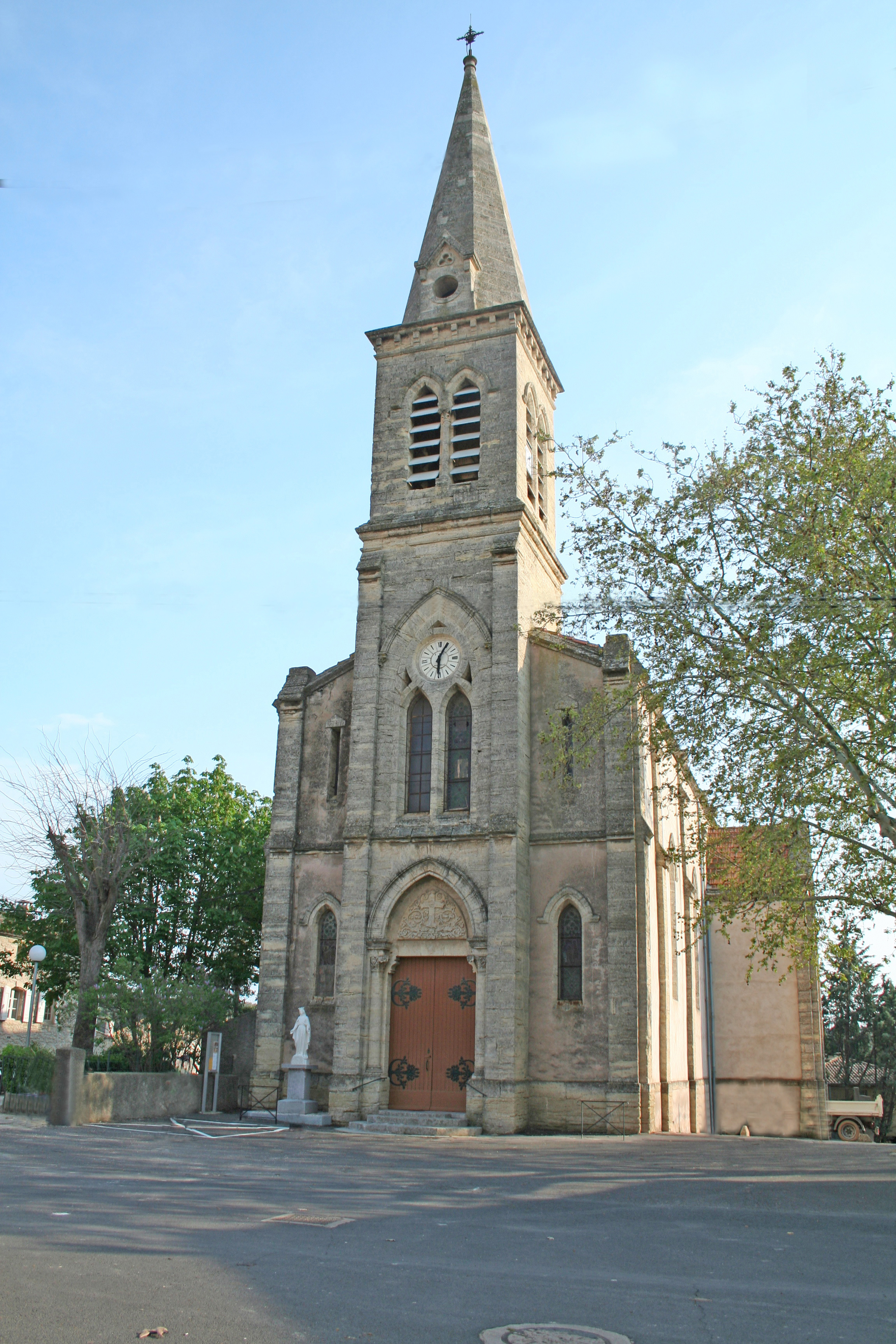 Aumes (Hérault) - Église Saint Aubin (1892).